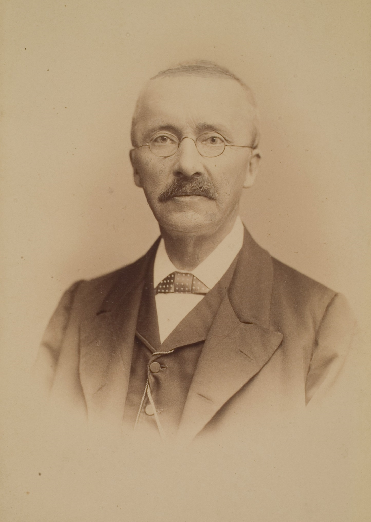 Heinrich Schliemann, Archäologe (1822–1890)